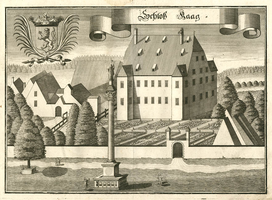 Schloß Haag” (Haag a. d. Amper), aus: Beschreibung des Churfürsten- u. Hertzogthumbs Ober- und Nidern Bayrn. Rentamt Landshut., 1723